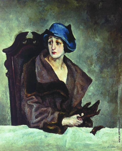 Женский портрет. 1910